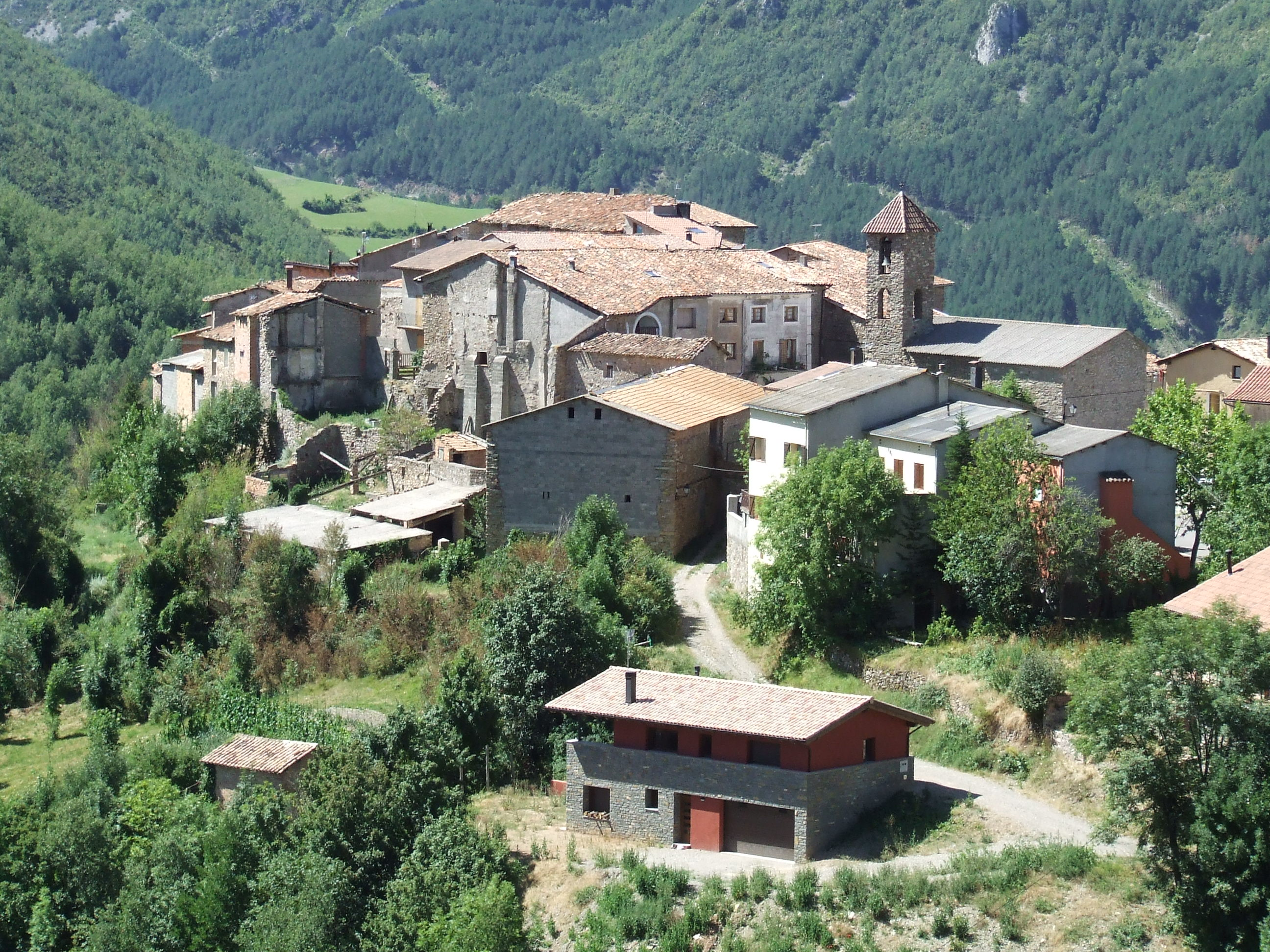 Malpàs (El Pont de Suert, Alta Ribagorça)